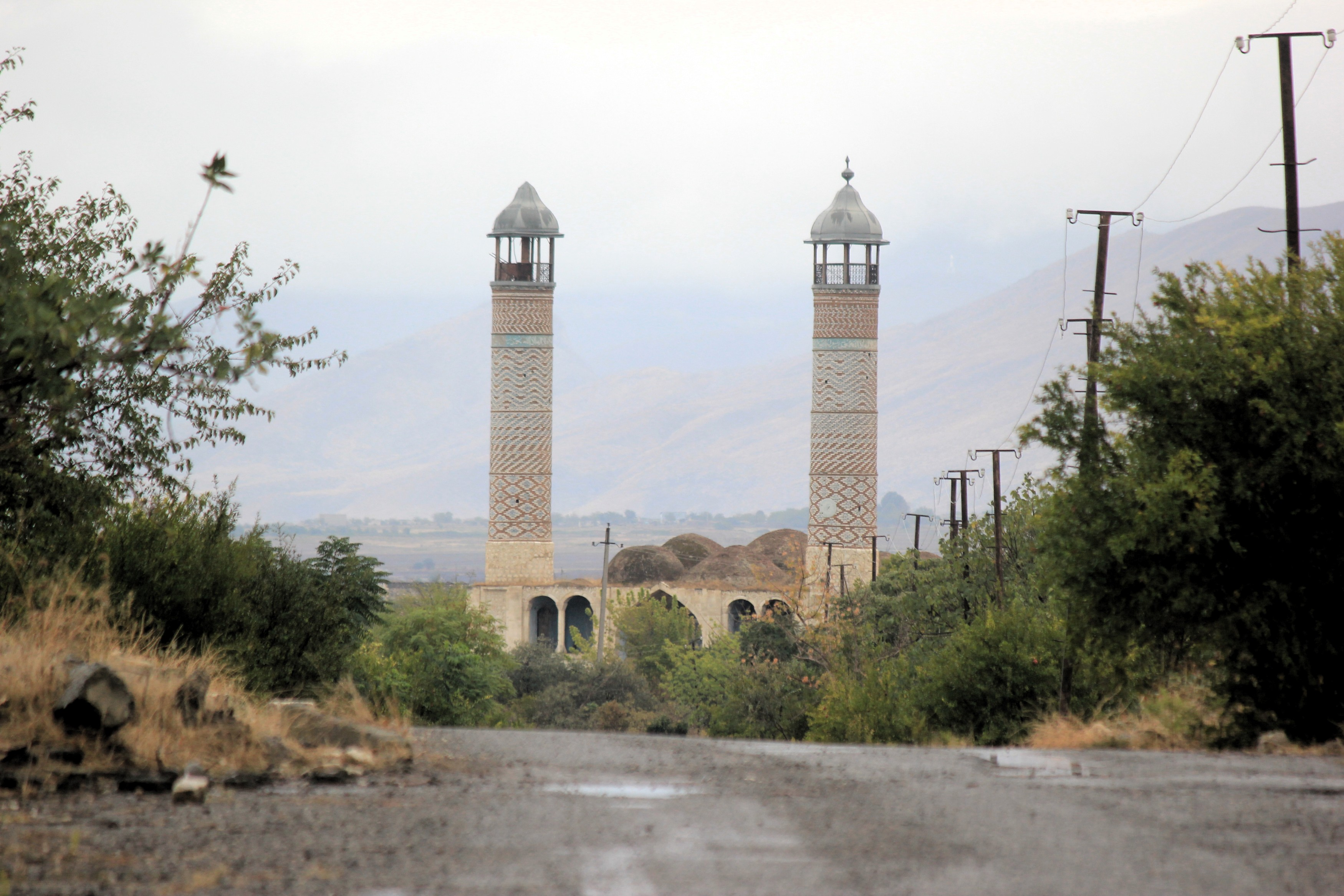 Geisterstadt Agdam, Bergkarabach.